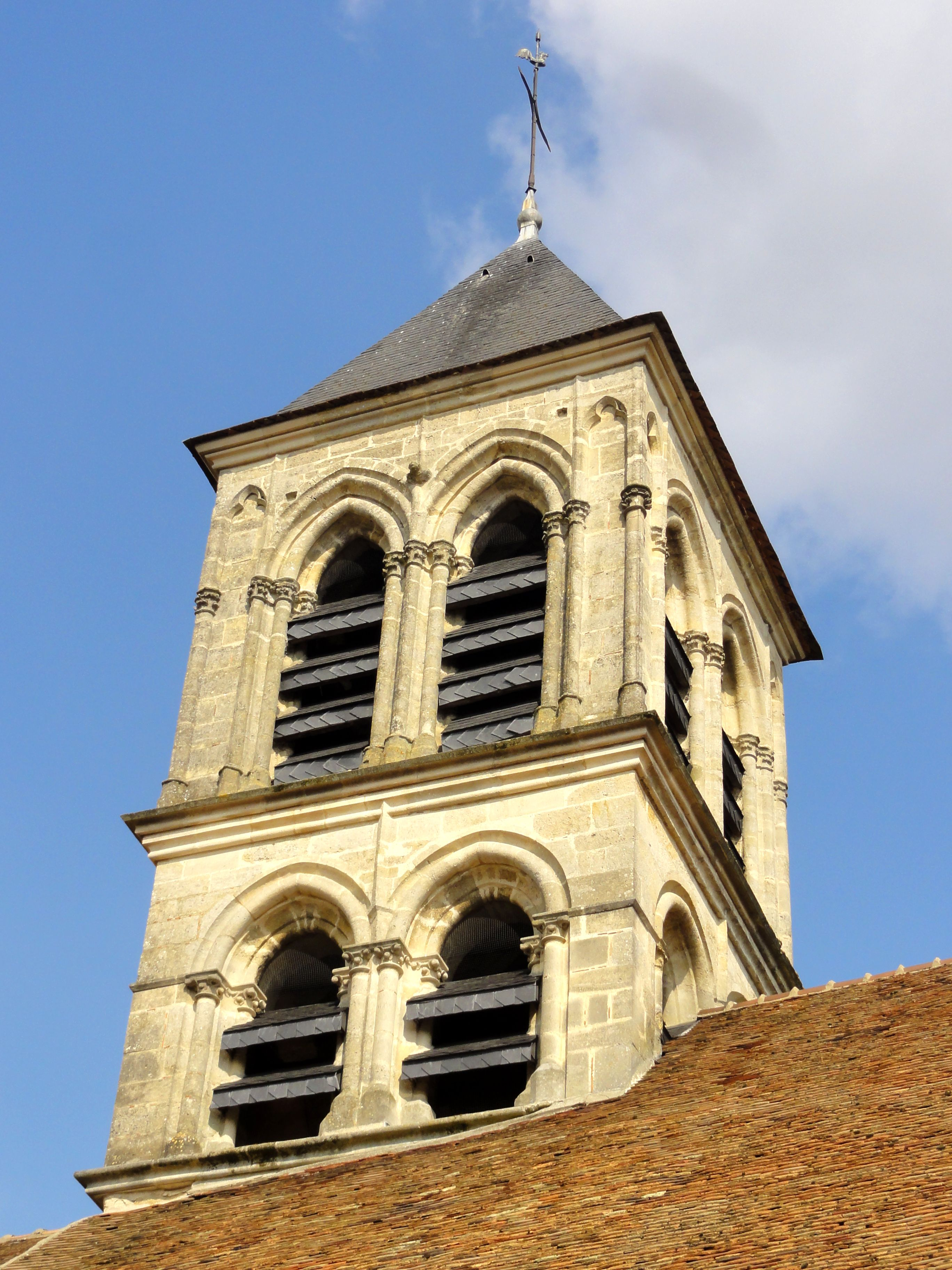 Clocher.